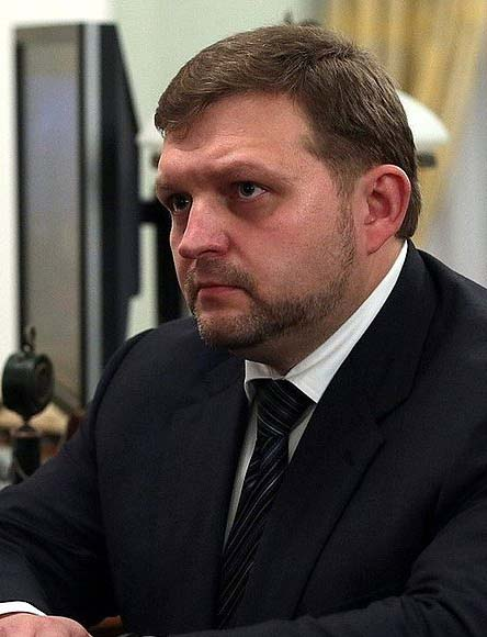 Никита Юрьевич Белых